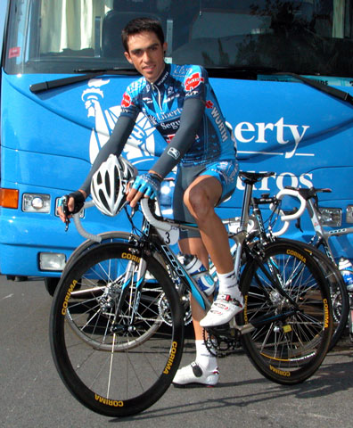 Afbeelding van Alberto Contador.